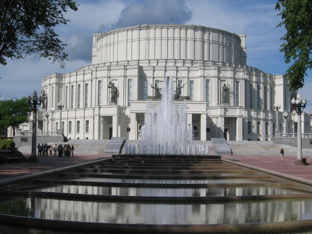 Белорусский национальный академический театр оперы и балета Беларуская (тарашкевіца): Нацыянальны акадэмічны Вялікі тэатар опэры і балету